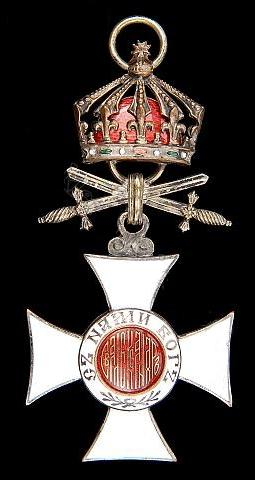 Bulgarien St.Alexander Orden Ritterkreuz mit Schwertern am Ring, versilbert